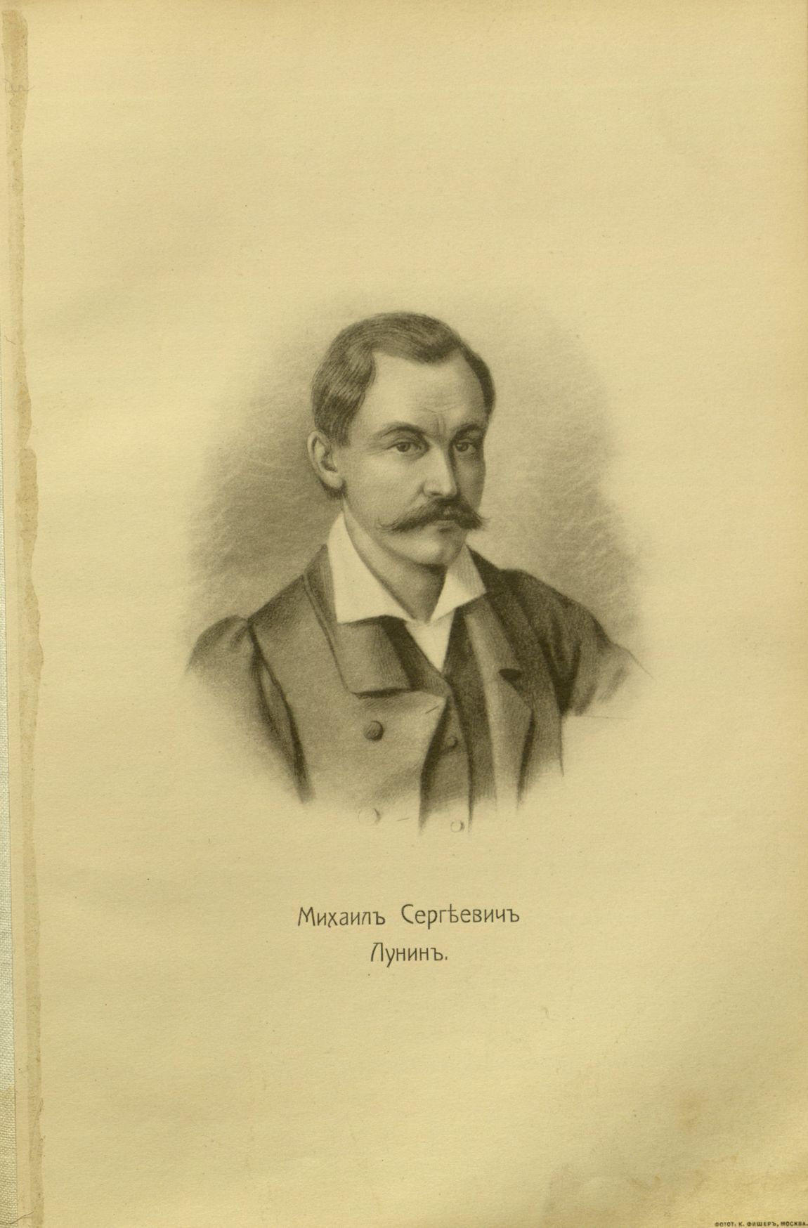 Головачев, П. М. Декабристы : 86 портретов, вид Петровского завода и 2 бытовых рисунка того времени. - М., [1906] Лунин, Михаил Сергеевич